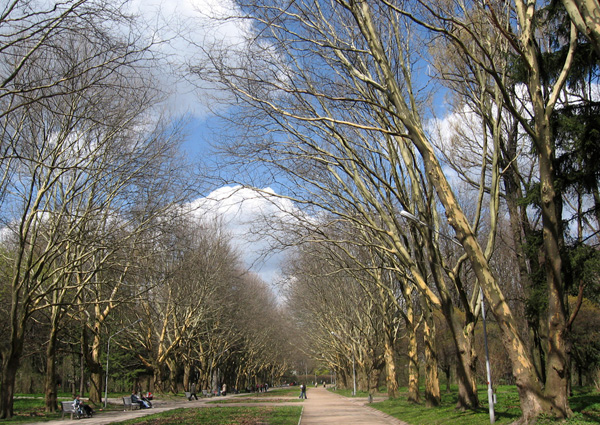 Platanus avenue in Lviv (Stryiskyi park)